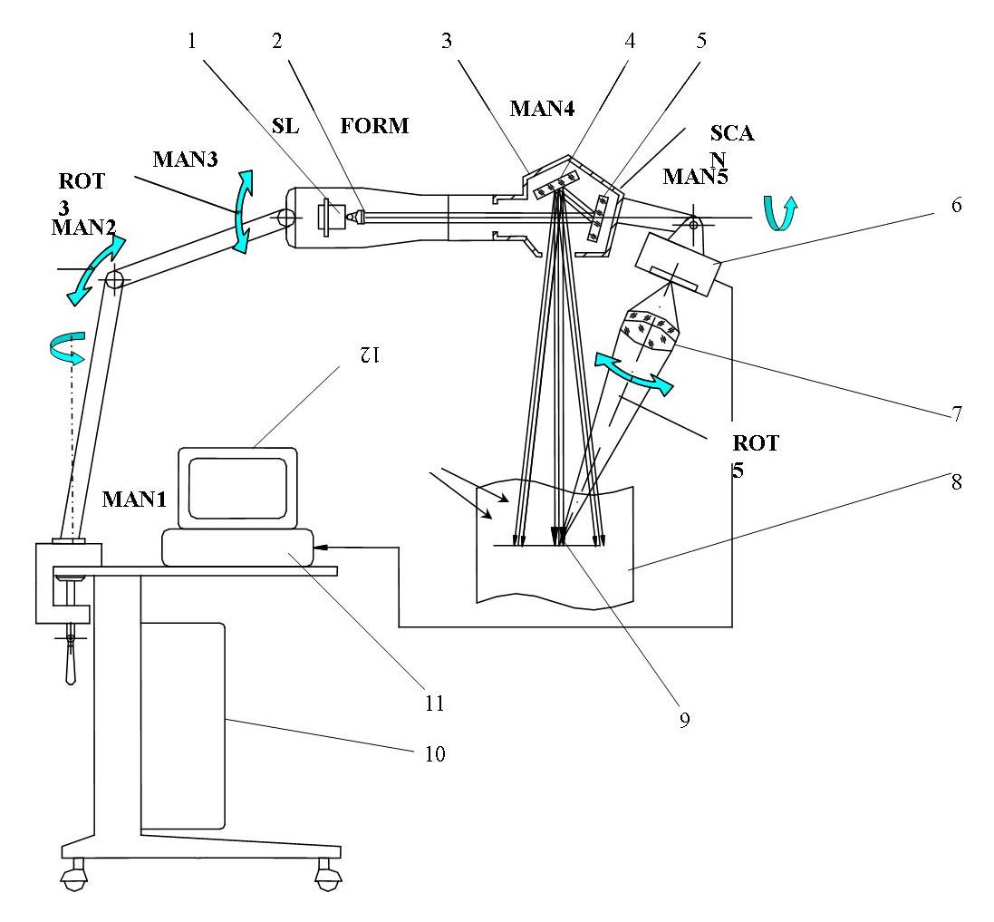 Схема лазерного терапевтичного апарата сканера медичного СМ-3 виробництва ТОВ "Ніжинські лабораторії скануючих пристроїв". рисунок для статті Сканер медичний СМ-3. Nizh Labs of Scannig - 73